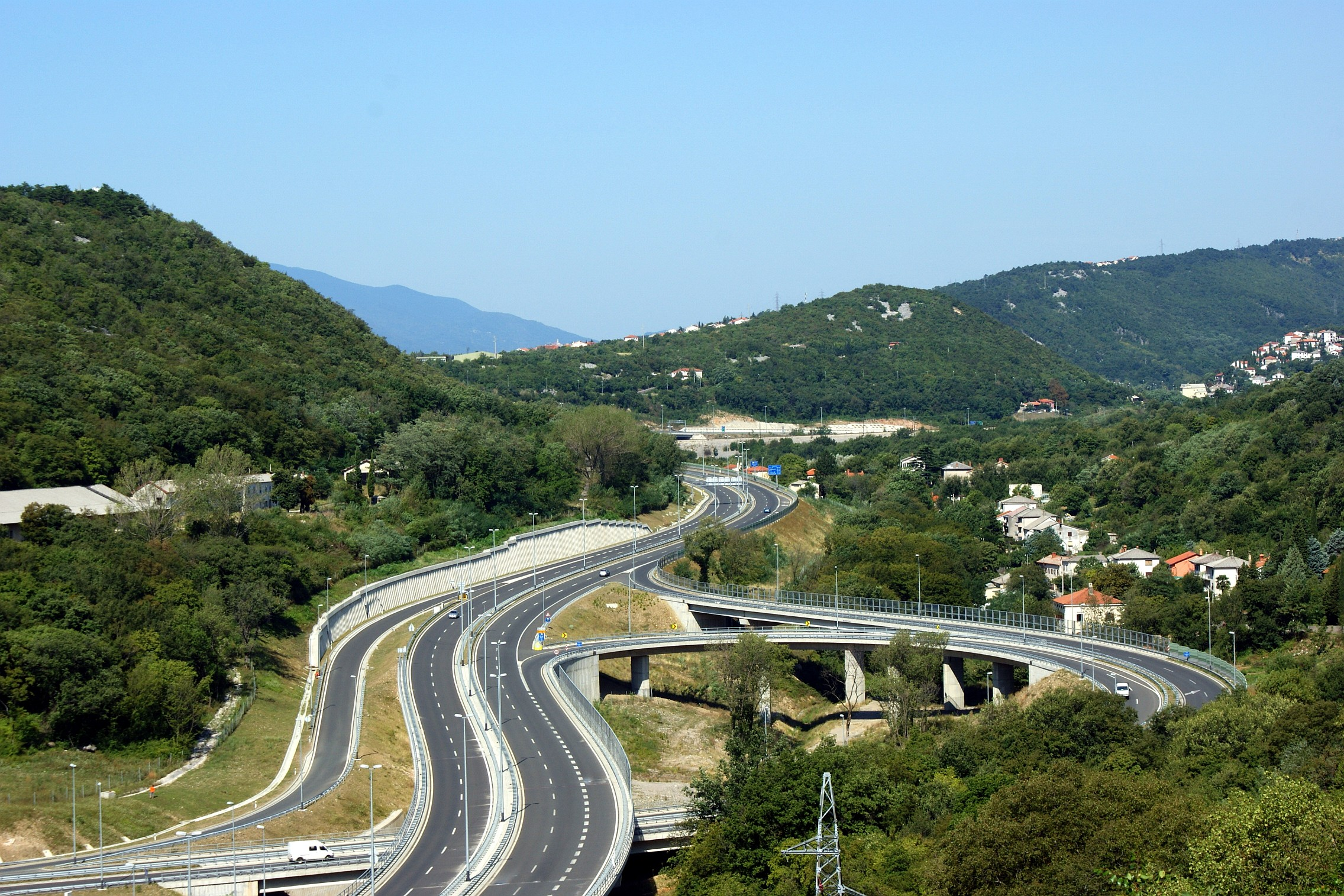 Zaobilaznica kroz Dragu